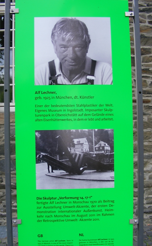 Erklärungstafel neben Skulptur von Lechner in Monschau